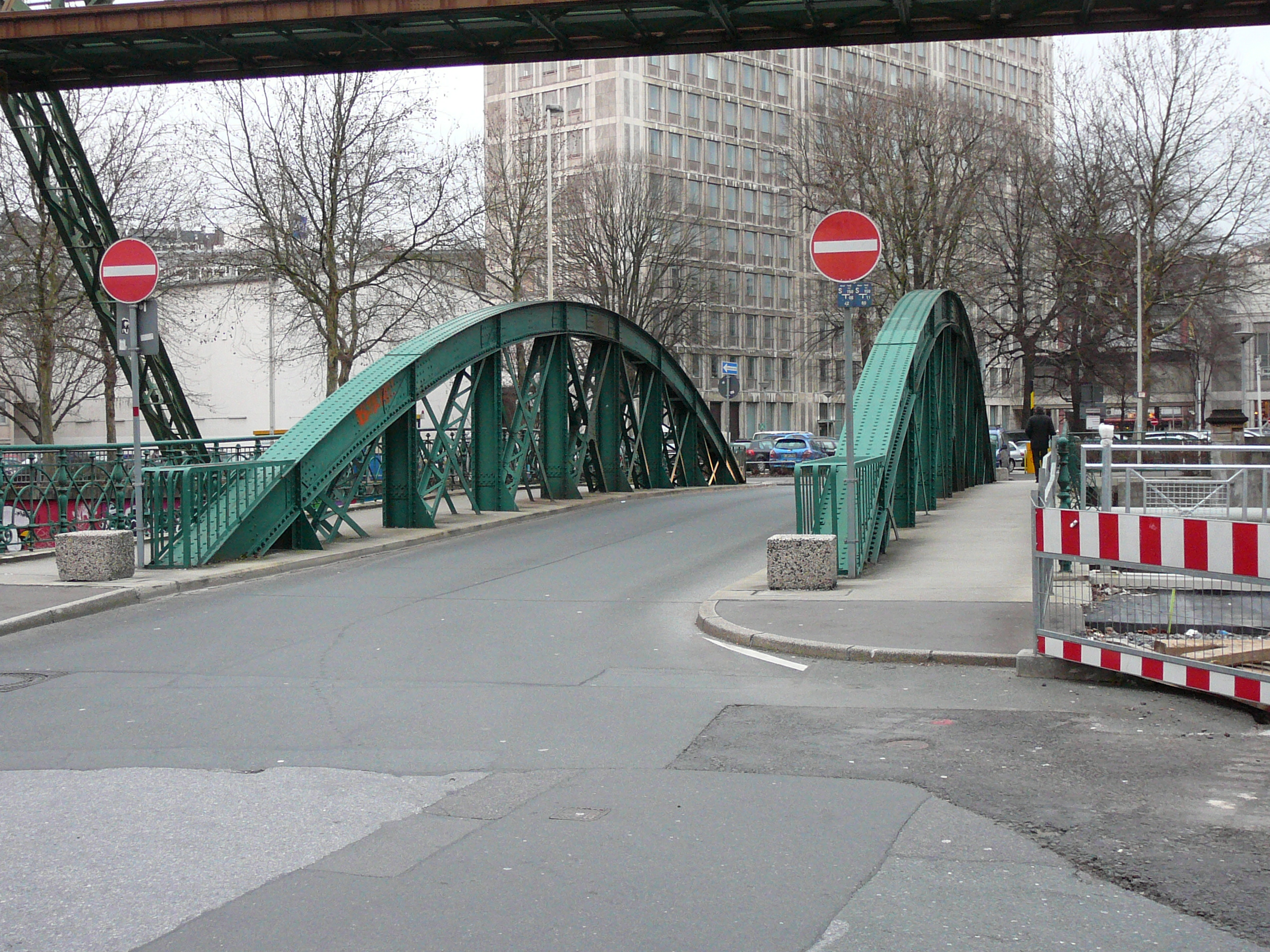 Alexanderbrücke, Wuppertal